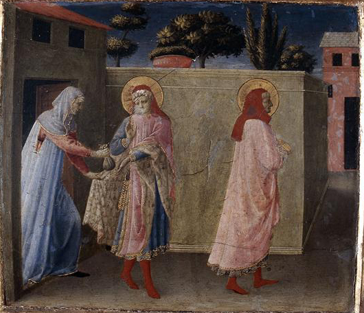 Angelico, san damniano riceve denaro